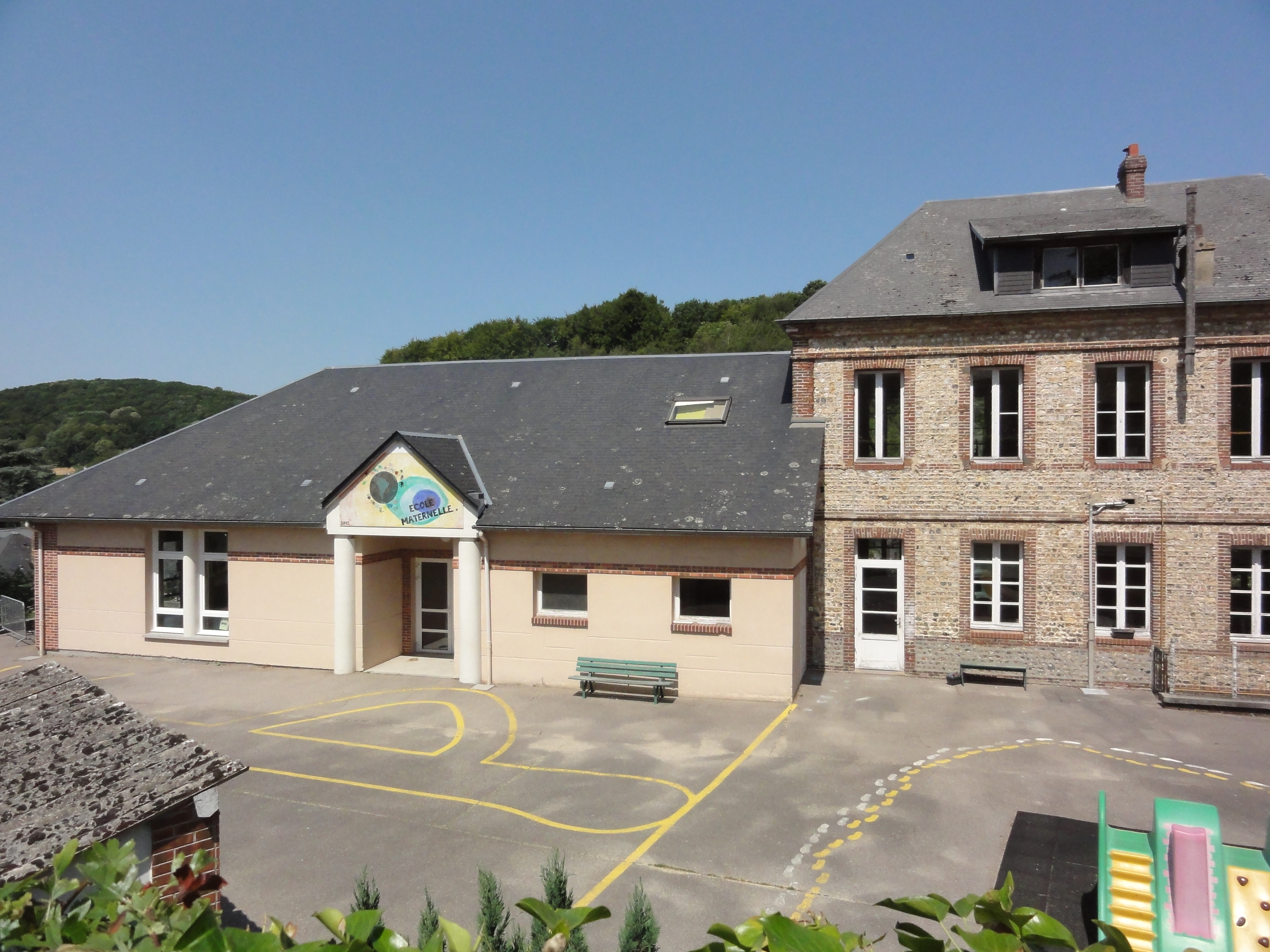 Colleville (Seine-Mar.) école maternelle